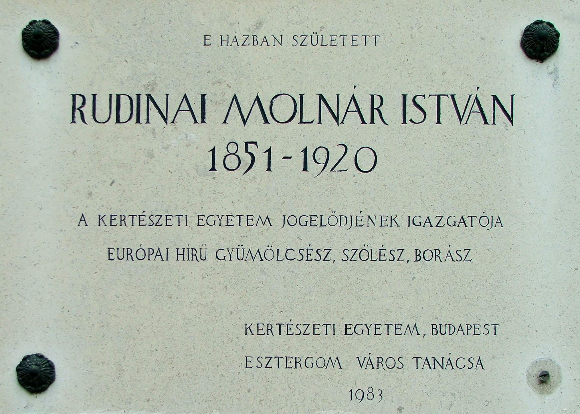 Rundinai szülőháza a Kossuth L utcában